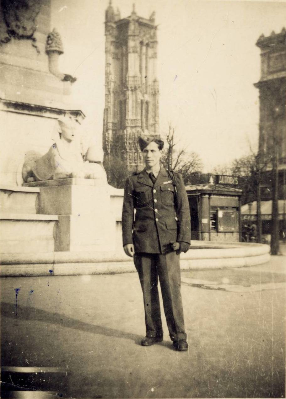 Manuel Fernández Arias en París, recuperándose de sus heridas en el invierno de 1944.